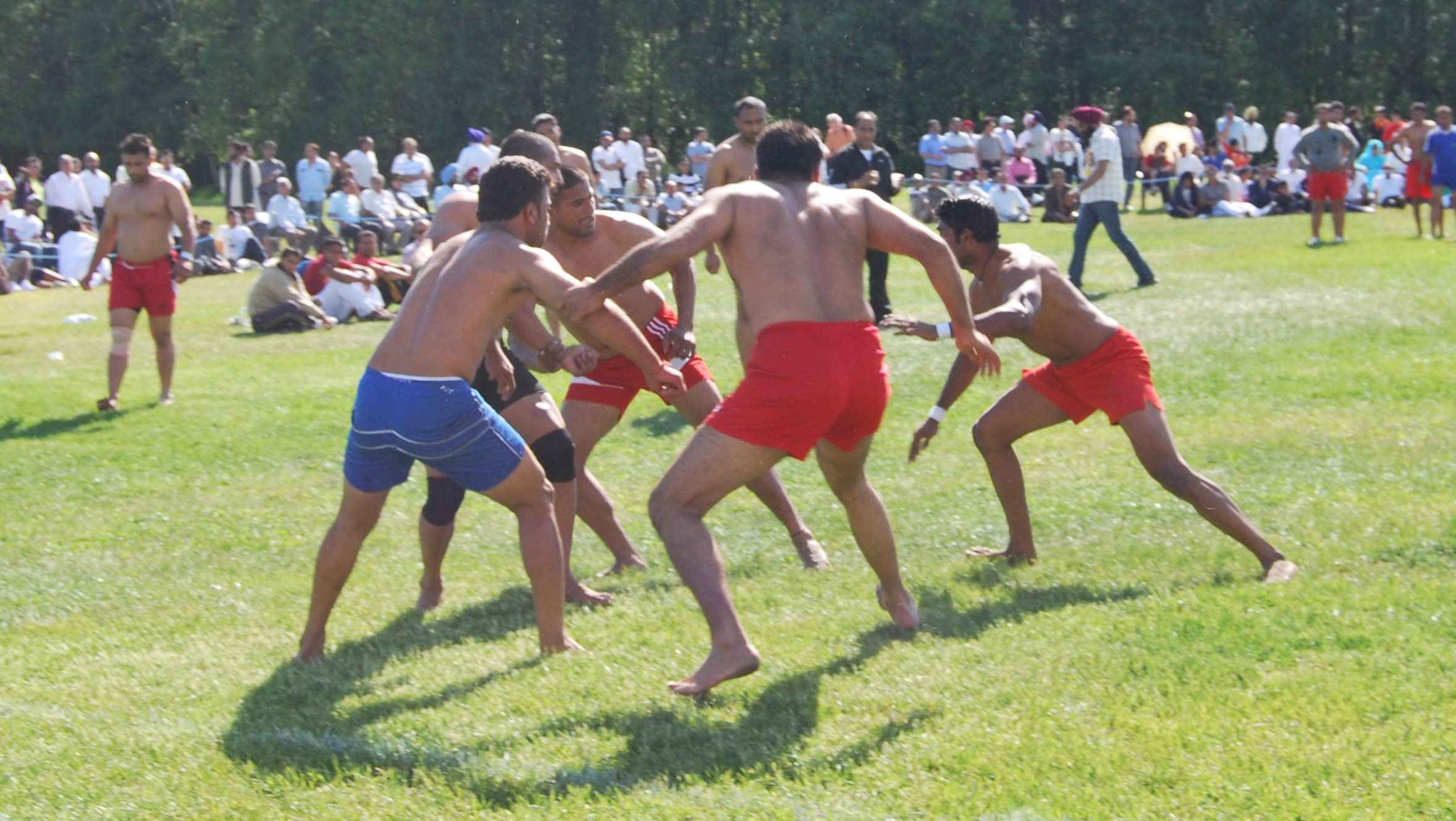 Kabaddi; gracący.